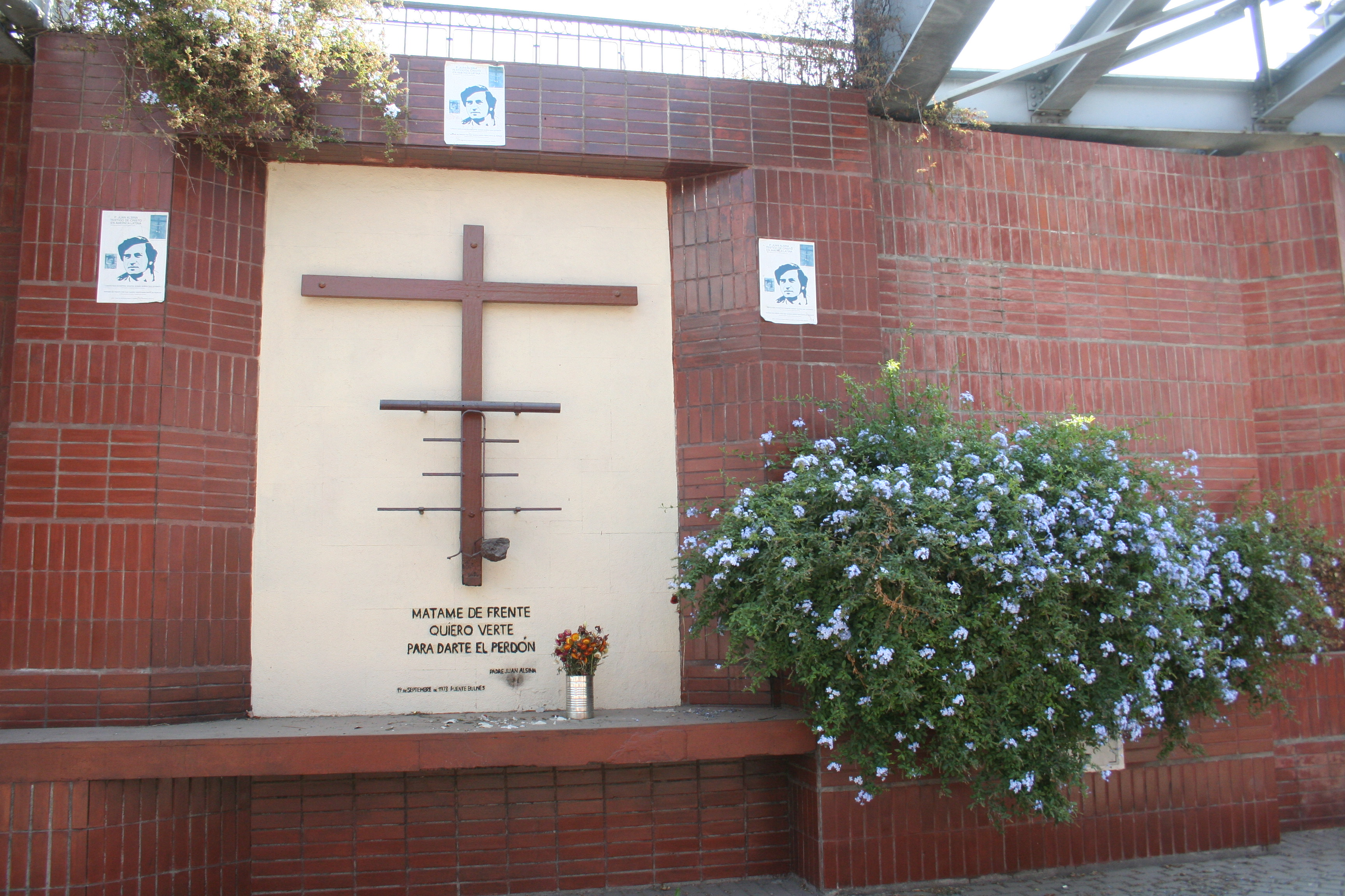 Memorial conmemorativo de la violación de los DDHH en Chile durante el régimen de Pinochet